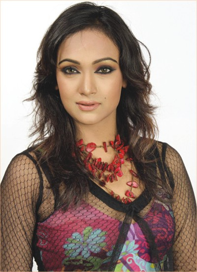 Bangladeshi model Afsana Ara Bindu